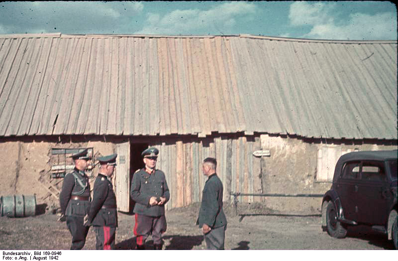 Treffen der Kommandeure bei Paulus, Ort unbekannt August 1942, vor Stalingrad